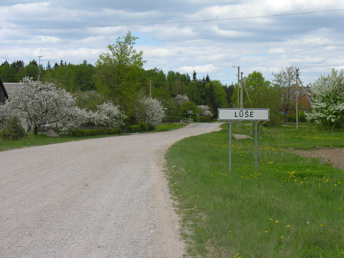 Lūšė, Mažeikių raj., Židikų seniūnija. Kelias Židikai-Pikeliai Foto: Algirdas, 2006 m. gegužės 17 d.